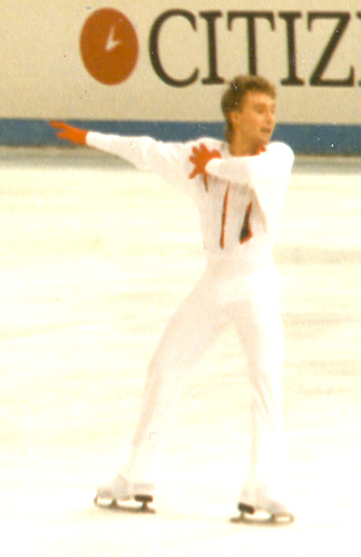 Alexander Fadejew hier bei den Weltmeisterschaften 1989 in Paris